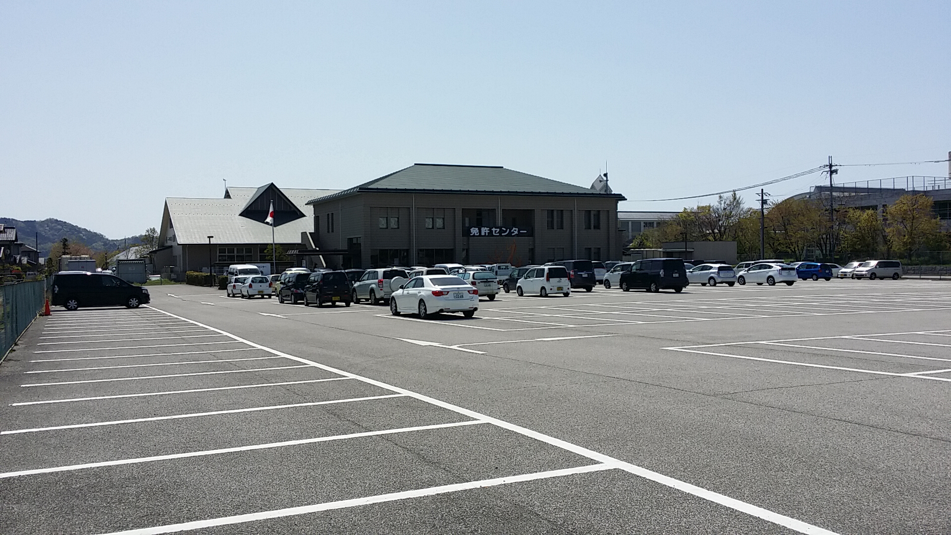 運転免許サブセンター 米原分室 全景